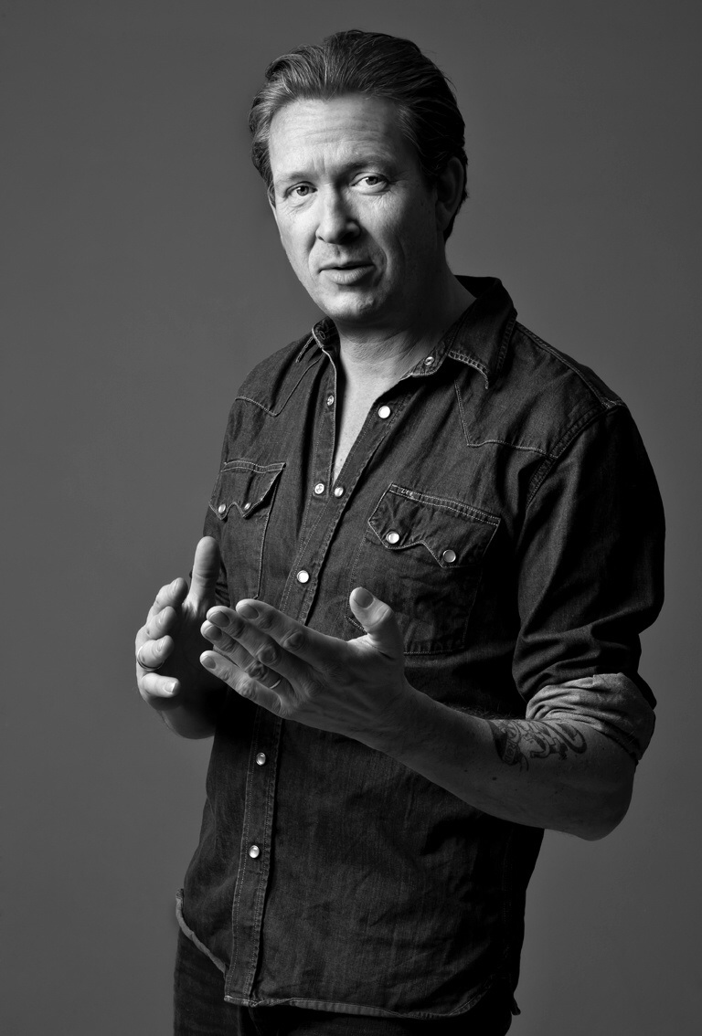 Anders Blichfeldt 2014